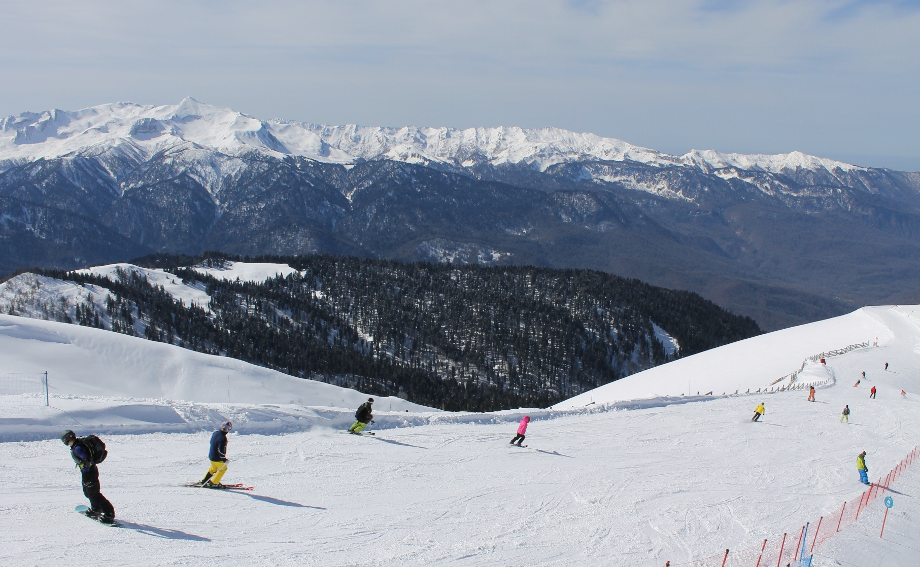 Вид на хребет Арабика в Абхазии с хребта Аибга, горнолыжный курорт Роза Хутор